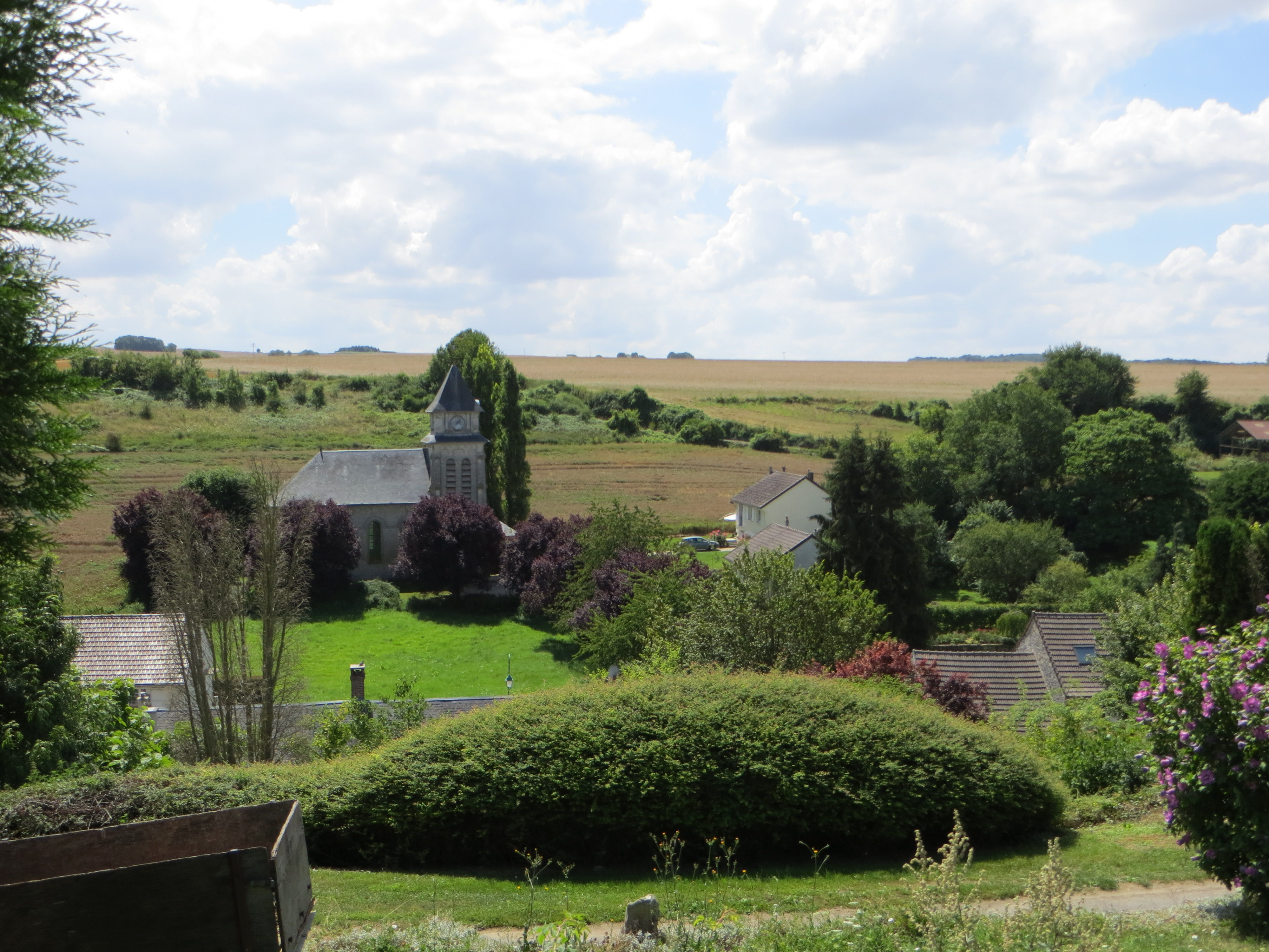 Vue générale de l'église